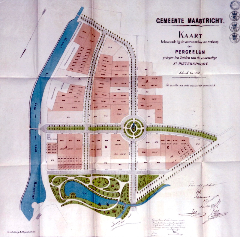 Ontwerp uit 1886 voor het Villapark te Maastricht door Willem Jean Brender à Brandis.